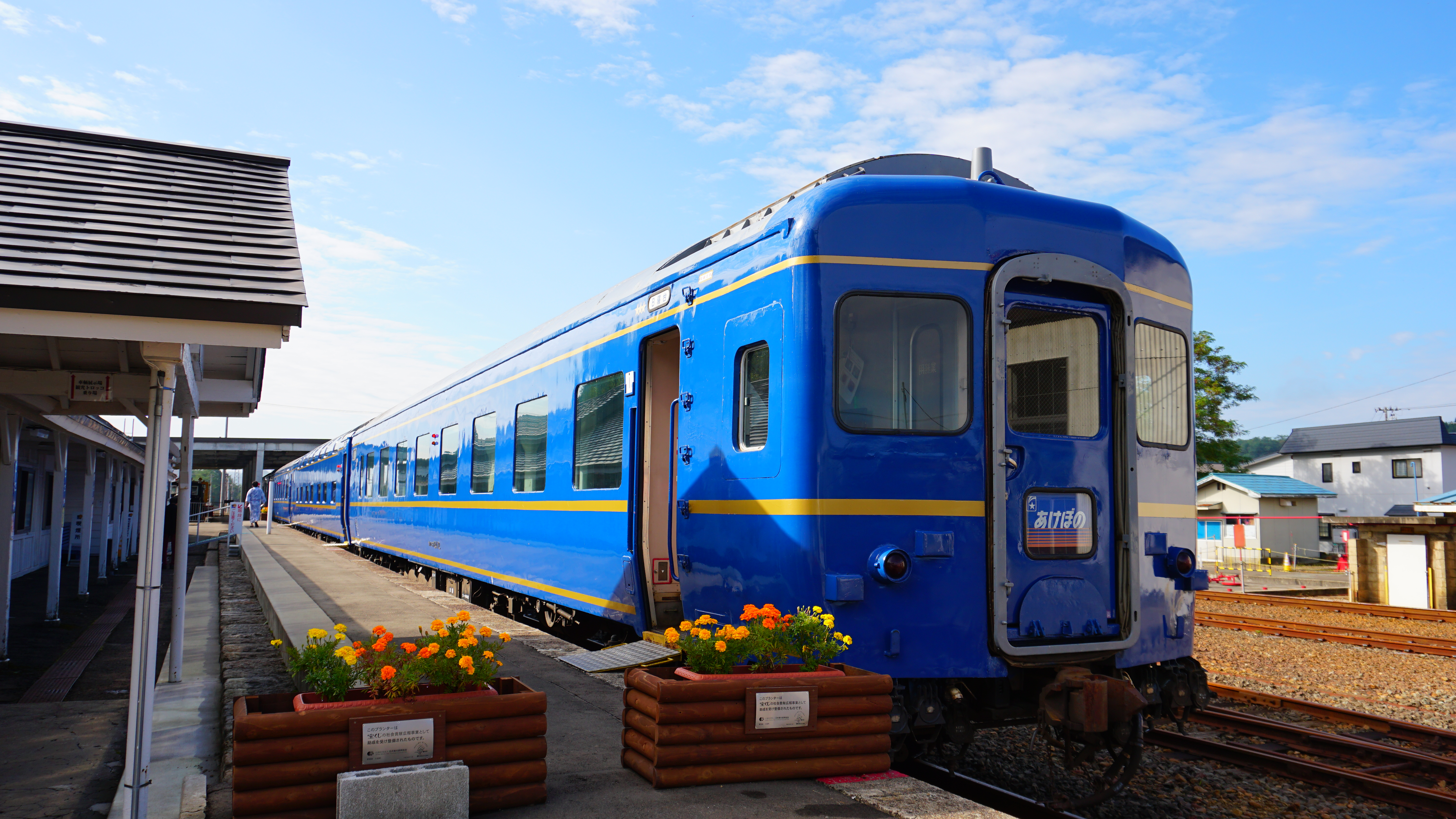 秋田県小坂町、小坂鉄道レールパークに設置されているホテル「ブルートレインあけぼの」。客車は寝台特急「あけぼの」で使用された24系寝台車を使用、朝夕に2回、構内移動のため牽引走行が行われており、国内で唯一動態状態で保存された列車ホテルである。